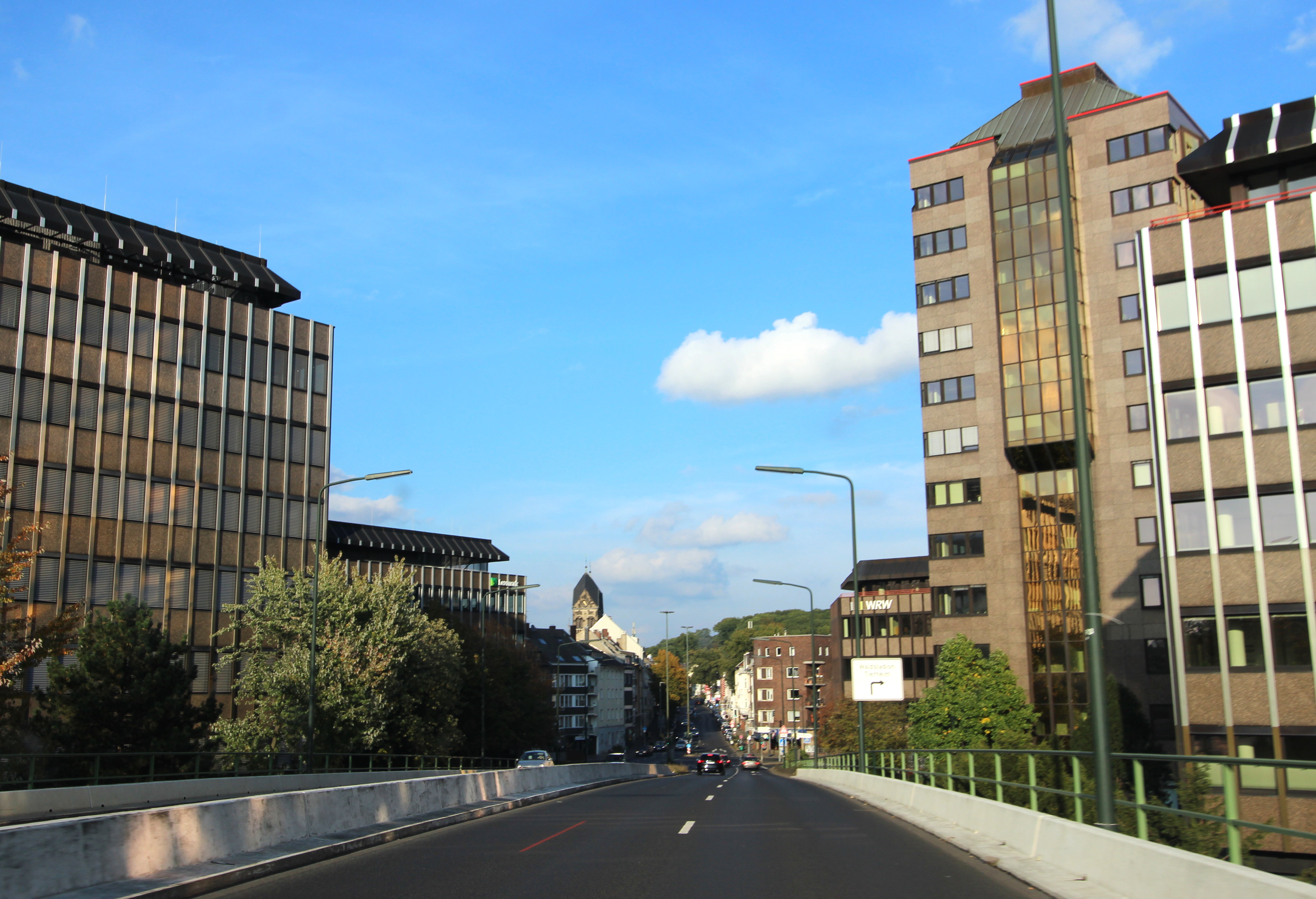 40472 Düsseldorf-Rath; Auf der Brücke zwischen Mörsenbroich und Rath. Aufnahme von 2016.